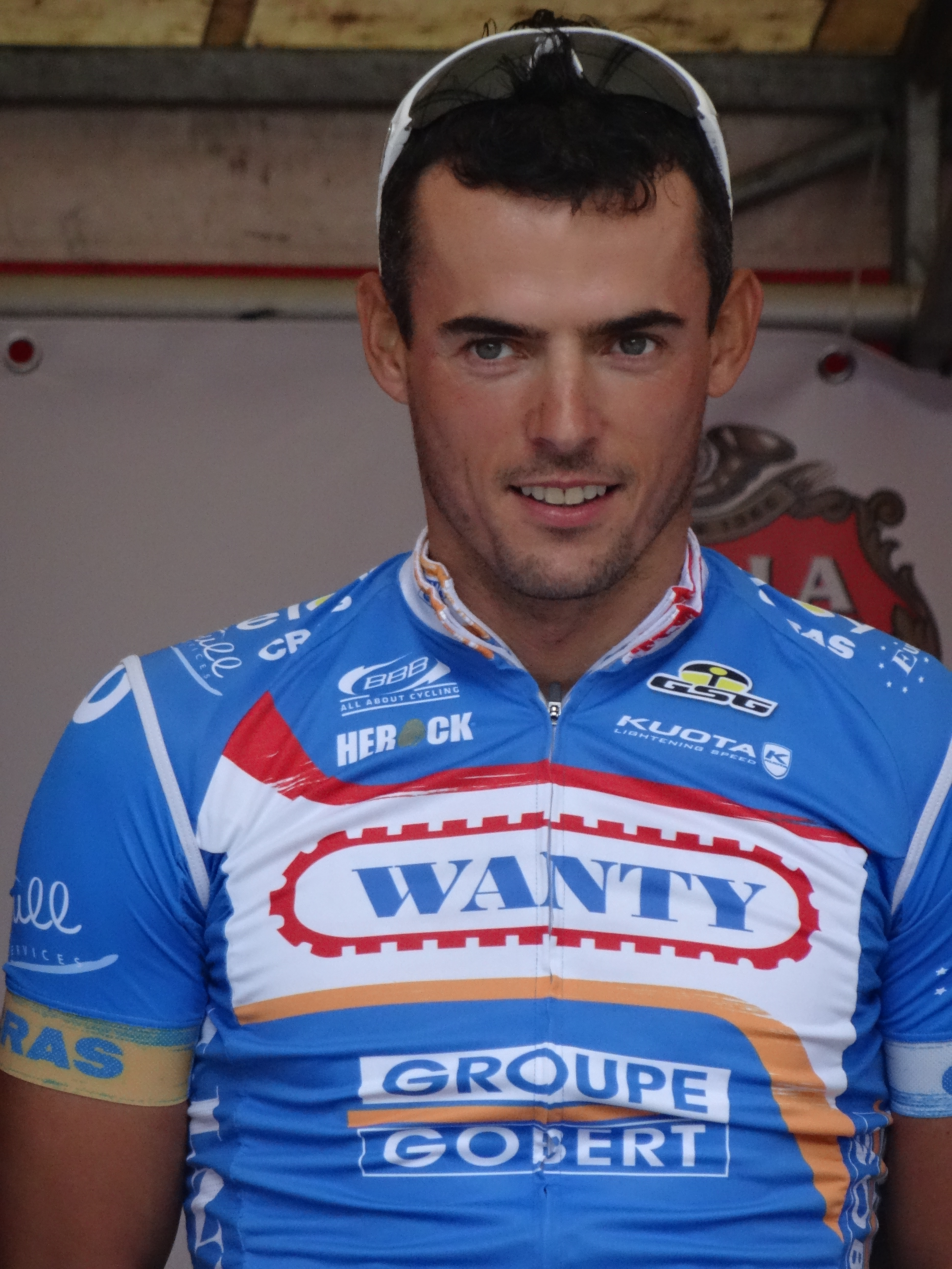 Reportage photographique réalisé le dimanche 14 septembre à l'occasion du départ et de l'arrivée du Grand Prix Jef Scherens 2014 à Louvain, Belgique.